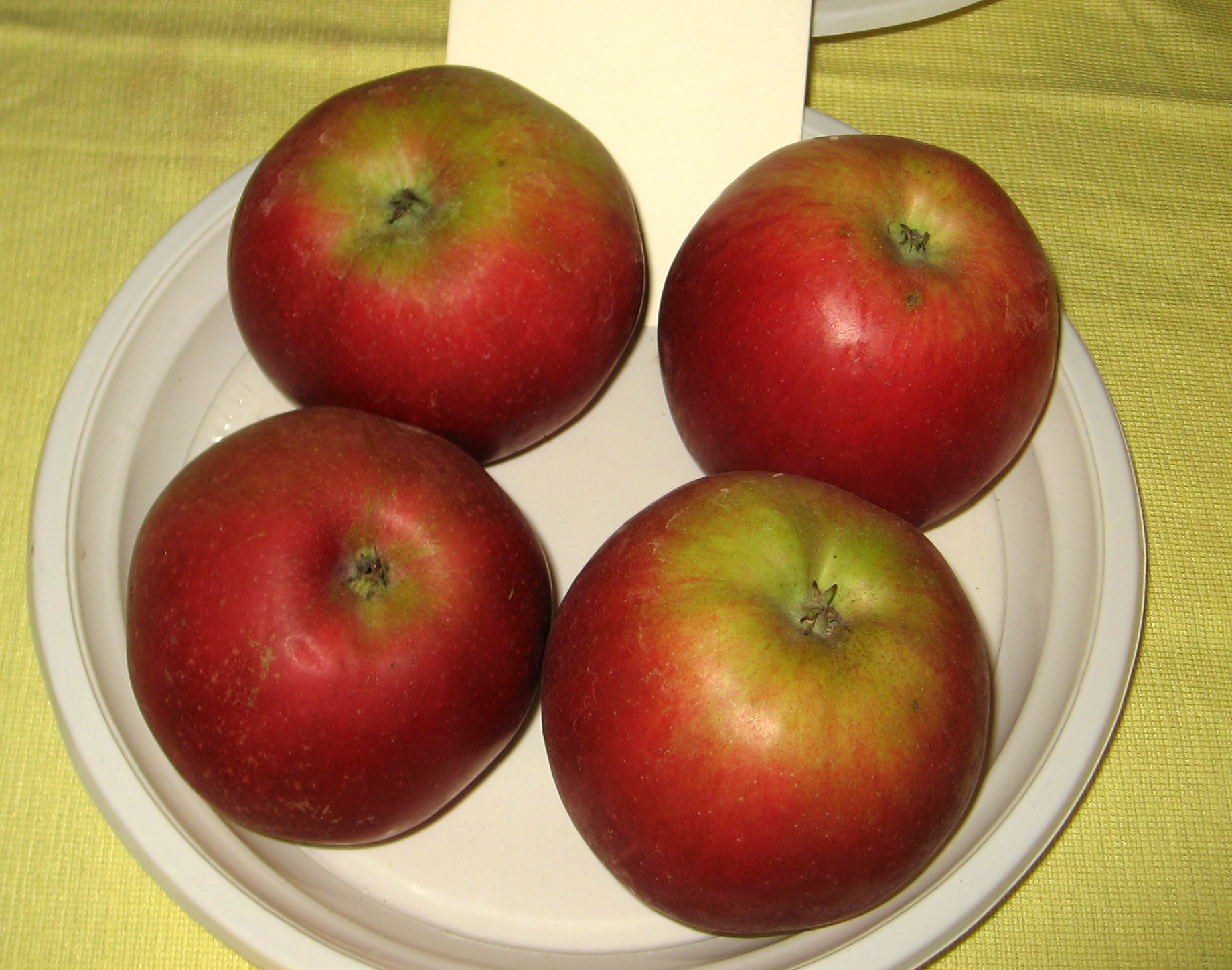 odrůda Idared